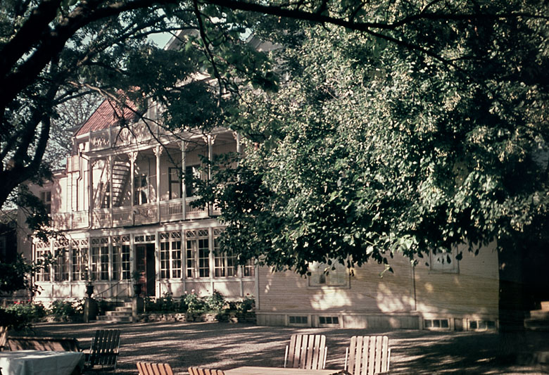 Ribbagården Motiv: Gränna Nyckelord: Riksintressen Kategori: Stadsmiljö, HotellRibbagården.